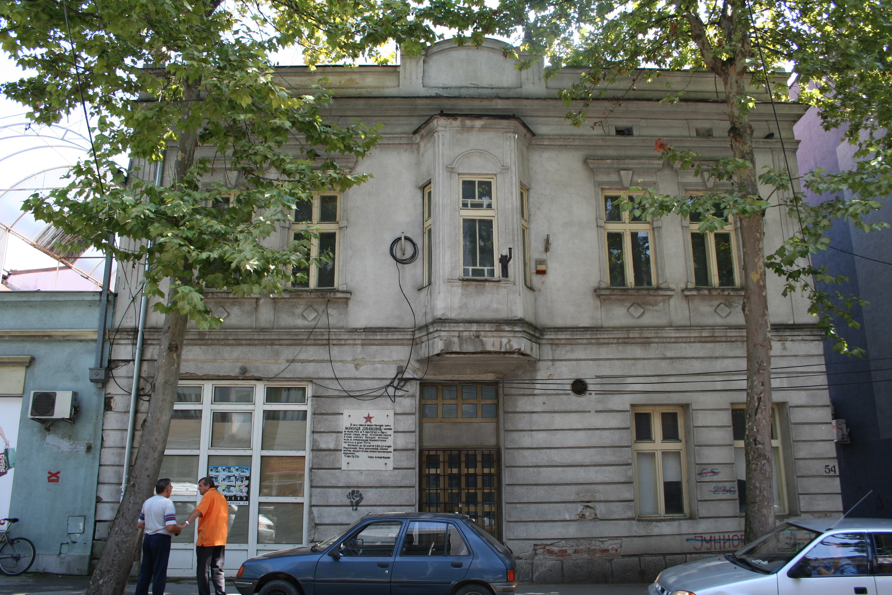 Kuća Milana Jovanovića, Valjevo